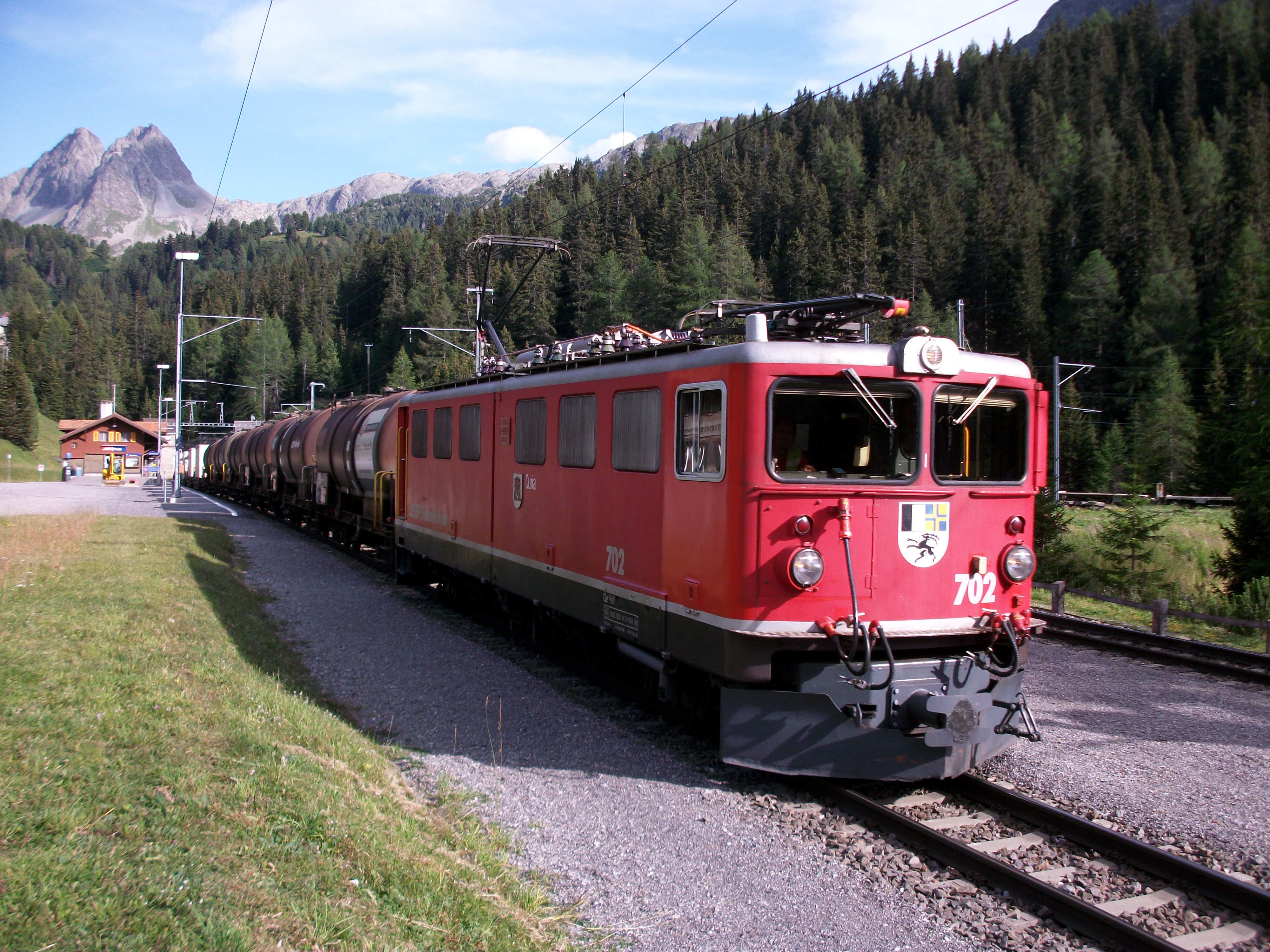 Güterzug ausfahrend Bahnhof Preda gezogen von Lok RhB Ge 6/6 II 702 Curia